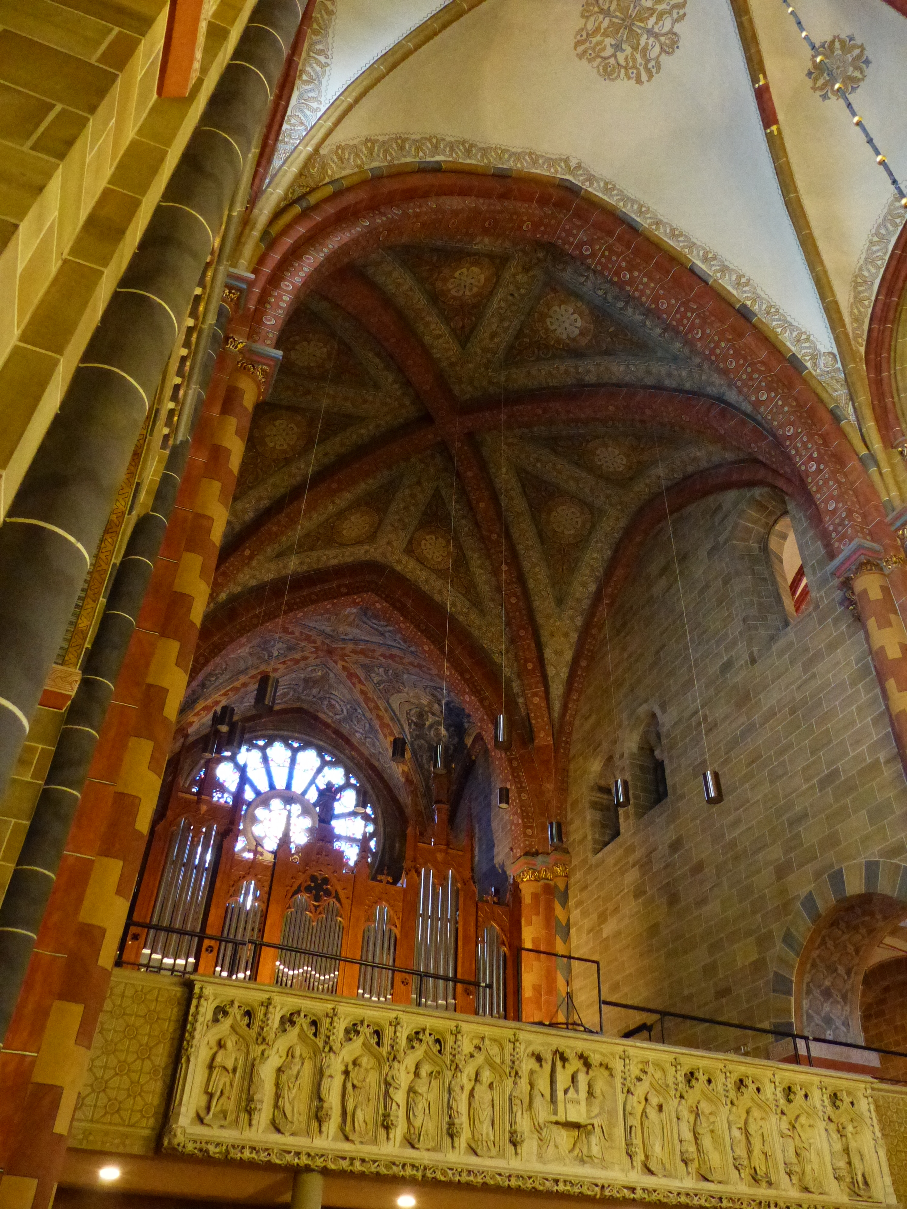 Die beiden westlichen Joche (Orgeljoche) des Mittelschiffs sind die zuerst eingewölbten des Bremer Doms